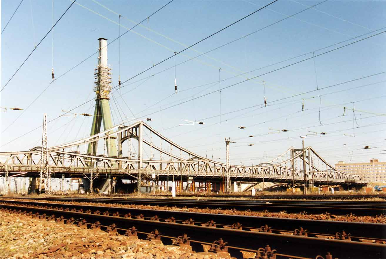 Berliner Brücke Halle (Saale), Blick von Süden, alte Brücke im Vordergrund (Abriß 2006), dahinter Pylon des Neubaus